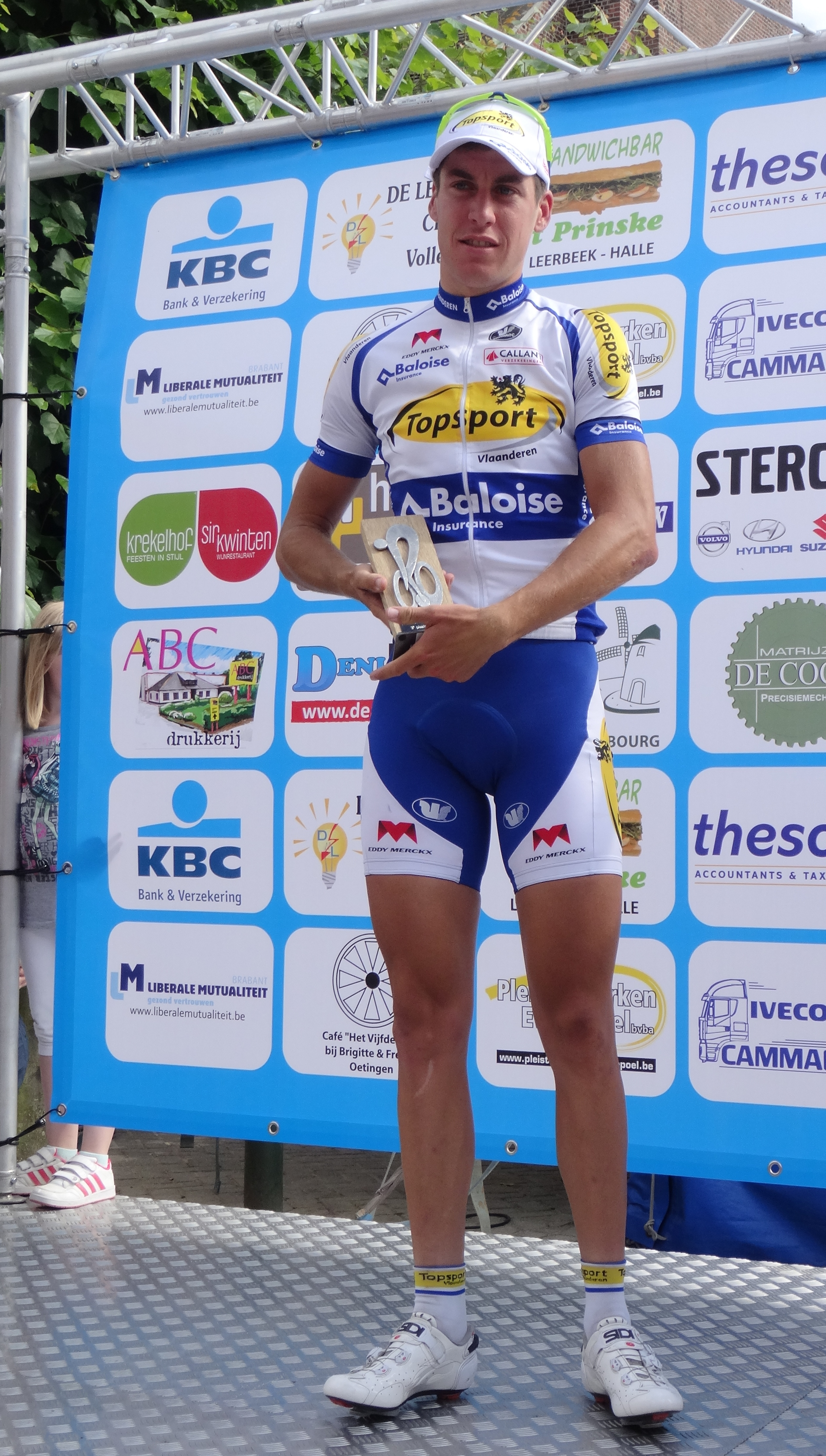 Reportage photographique réalisé le mercredi 25 juin à l'occasion du départ et de l'arrivée de l'Internationale Wielertrofee Jong Maar Moedig 2014 à Oetingen (Gooik), Belgique.